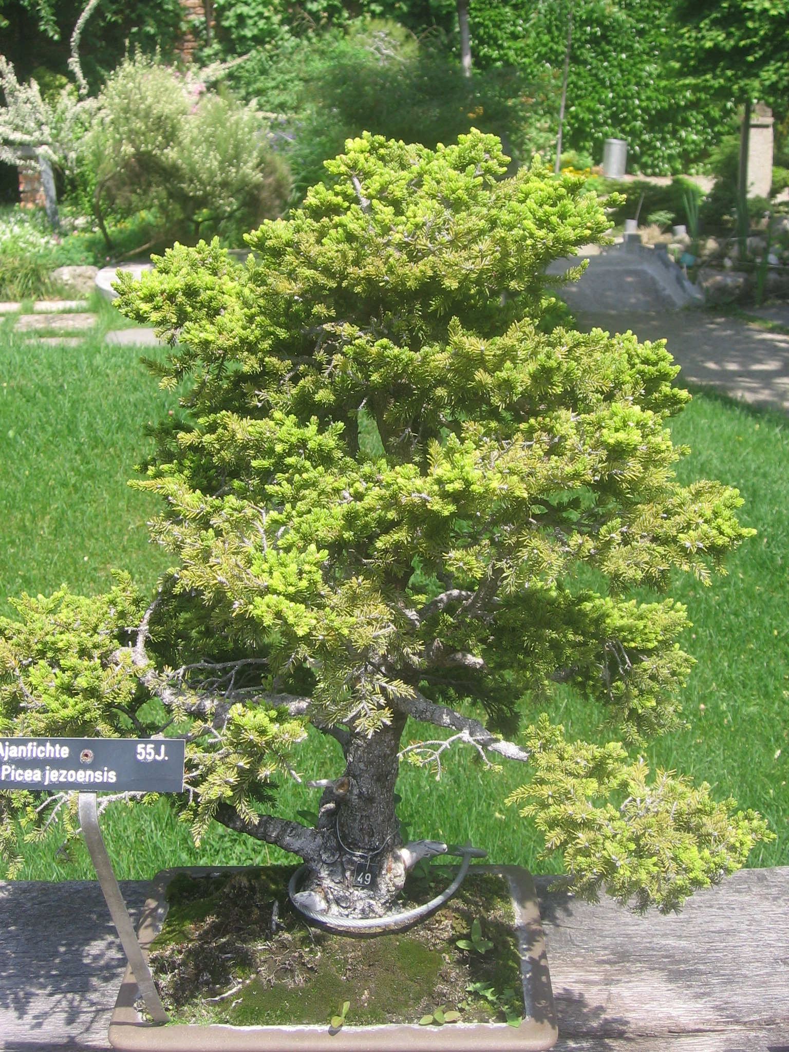 autor:Vladaig my photo